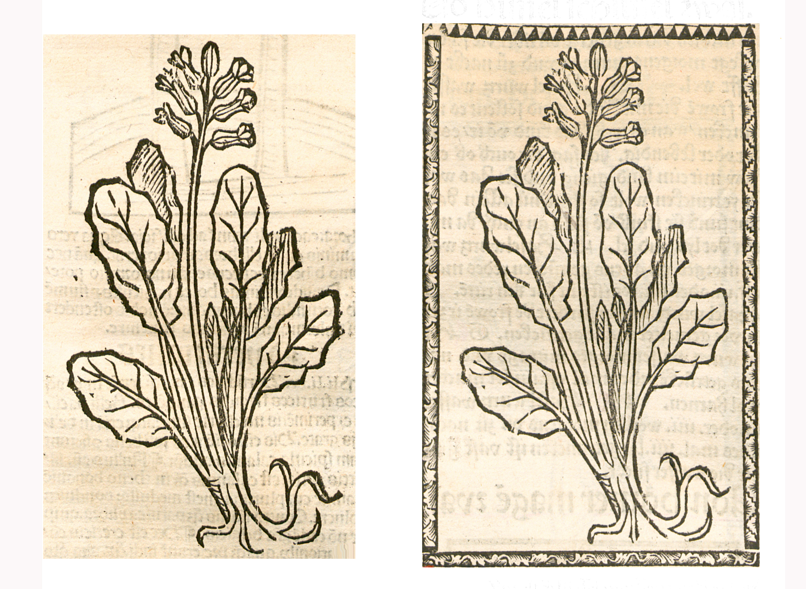 Abbildung von: Himmel Schlüssel (Primula veris)